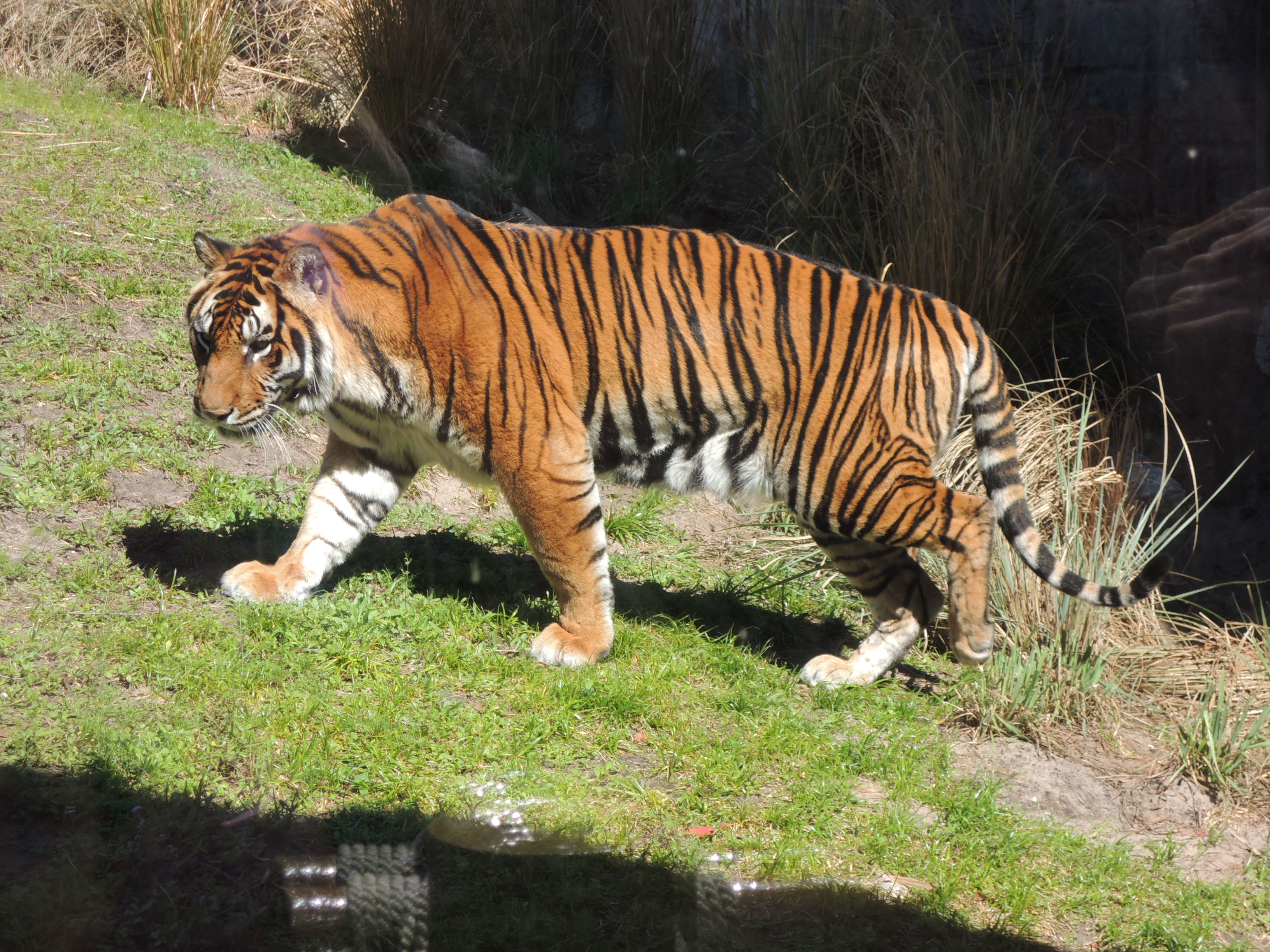 Un tigre (Panthera tigris) à Disney's Animal Kingdom.